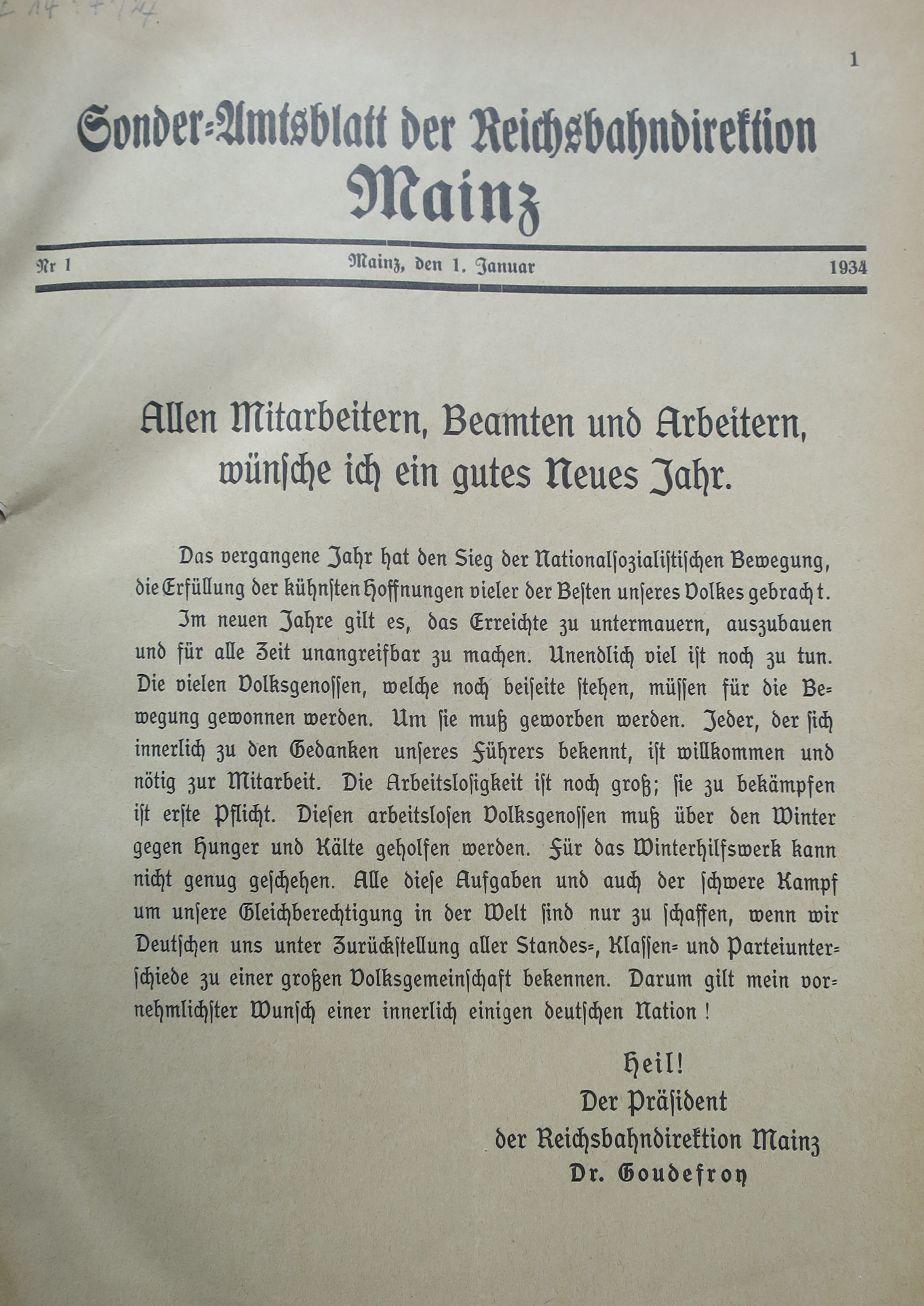 Deutsche Reichsbahn-Gesellschaft (Hg.): Amtsblatt der Reichsbahndirektion Mainz vom 1. Januar 1934 (Nr. 1), S. 1 (Titelblatt): Neujahrsgruß des Präsidenten der Reichsbahndirektion Mainz, Erich Goudefroy